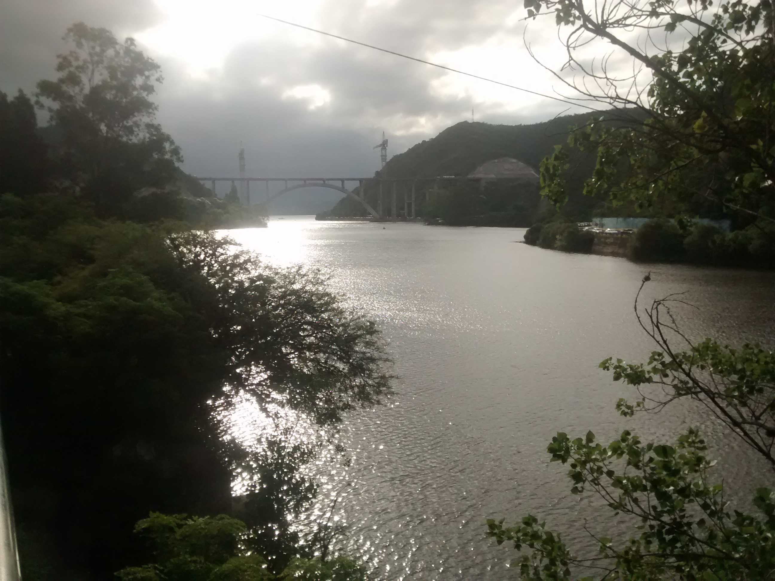 Atardecer sobre el espejo del Lago San Roque al fondo se puede ver el puente de la Autovía Punilla en construcción (2/2/2019)